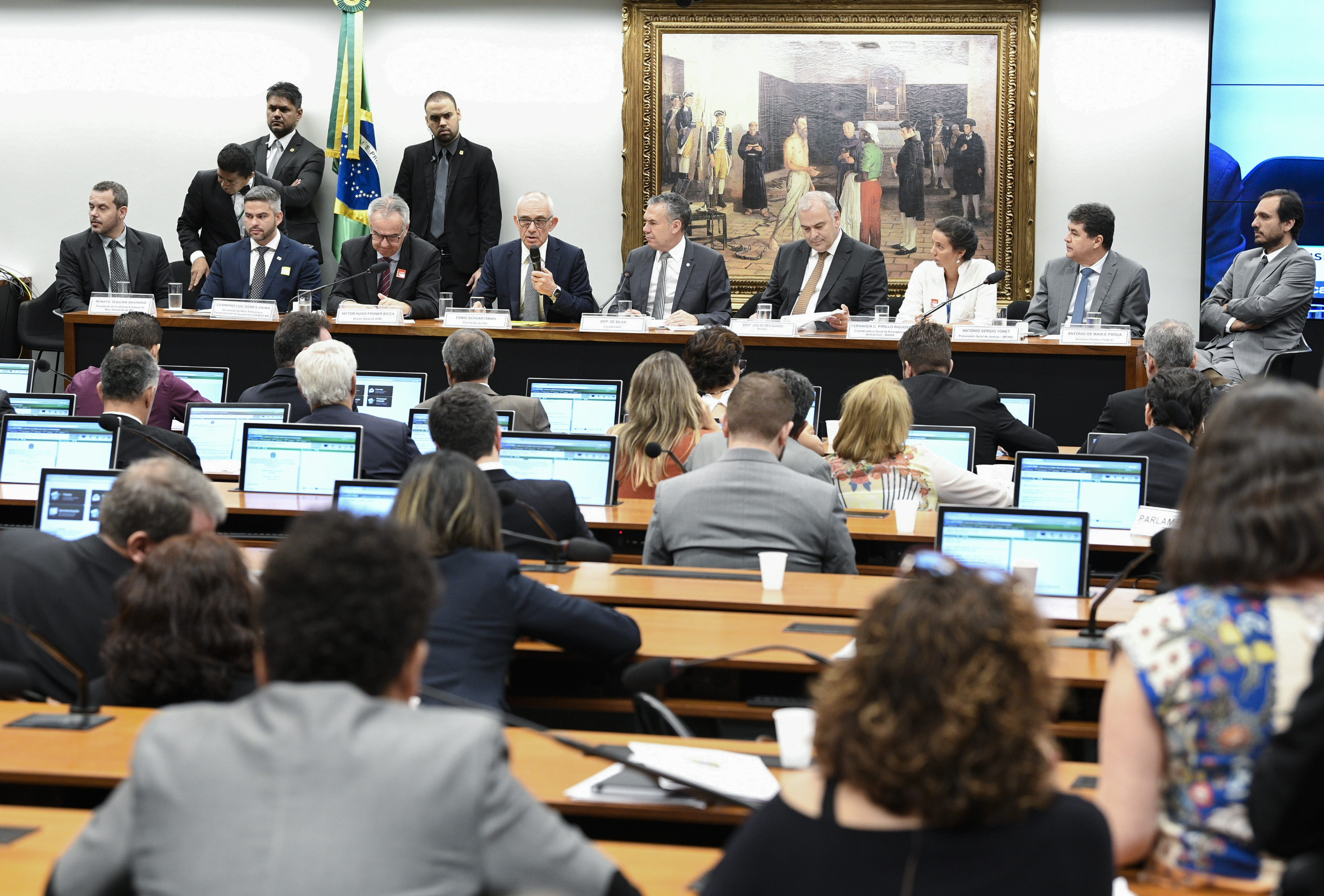 A Comissão Externa de Brumadinho ouve o presidente da Vale e o diretor-geral da Agência Nacional de Mineração (ANM). Autoridades mineiras também foram convidadas para dar explicações sobre o rompimento da barragem na cidade mineira de Brumadinho. Mesa: presidente da Fundação Estadual do Meio Ambiente de Minas Gerais, Renato Teixeira Brandão; secretário de Estado de Meio Ambiente e Desenvolvimento Sustentável de Minas Gerais (Semad-MG), Germano Luiz Gomes Vieira; diretor-geral da Agência Nacional de Mineração (ANM), Victor Hugo Froner Bicca; presidente da Vale, Fabio Schvartsman, em pronunciamento; coordenador da comissão, deputado Zé Vitor (PMN-MG); deputado Júlio Delgado (PSB-MG); coordenadora-geral de Emergências Ambientais do Instituto Brasileiro de Meio Ambiente e Recursos Naturais Renováveis (Ibama), Fernanda Cunha Pirillo Inojosa; procurador-geral de Justiça do Ministério Público do Estado de Minas Gerais, Antônio Sérgio Tonet; defensor Público Federal, Antônio de Maia e Pádua. Foto: Pedro França/Agência Senado